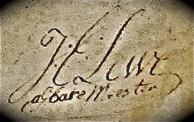 Handtekening van Agtbare Meester Jan Evert baron Lewe van Aduard van de vrijmetselaarsloge L'Union Provinciale op het meesterdiploma van Albert Jan de Sitter (Collectie CMC)